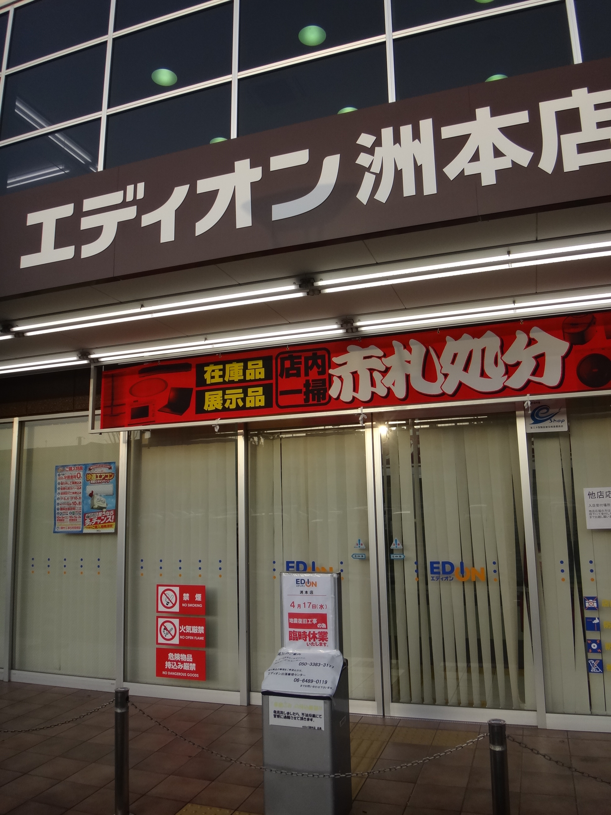 2013年4月の淡路島地震により営業を休止している家電量販店